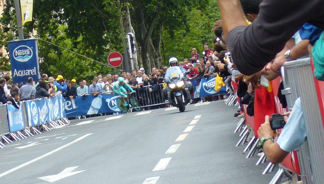 Le courreur cycliste kazakh Alexandre Vinokourov lors du contre la montre d'Albi du Tour de France 2007 Alexander Vinokourov durin the 2007 Tour de France TT in Albi.